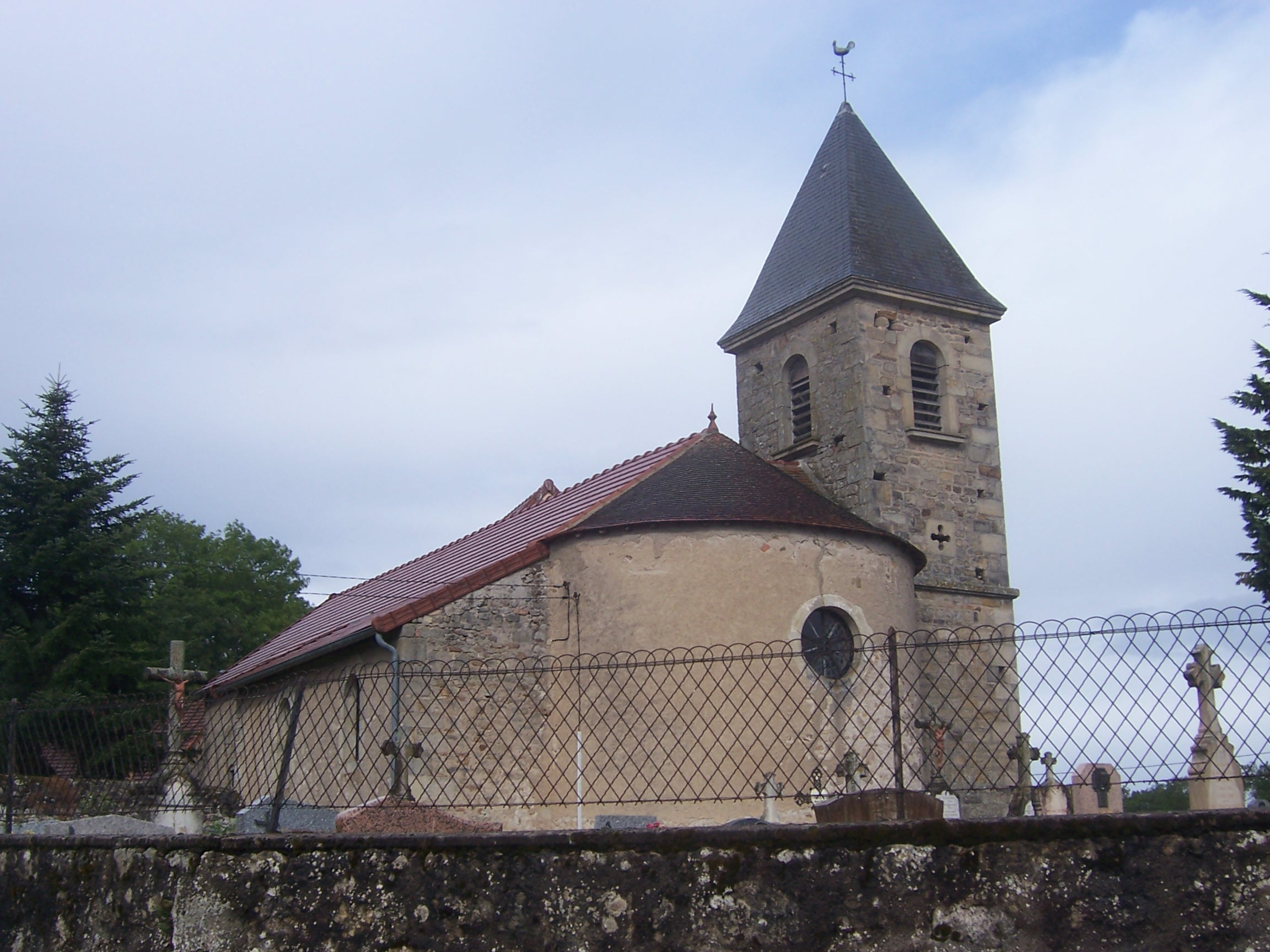 Eglise de Tintry